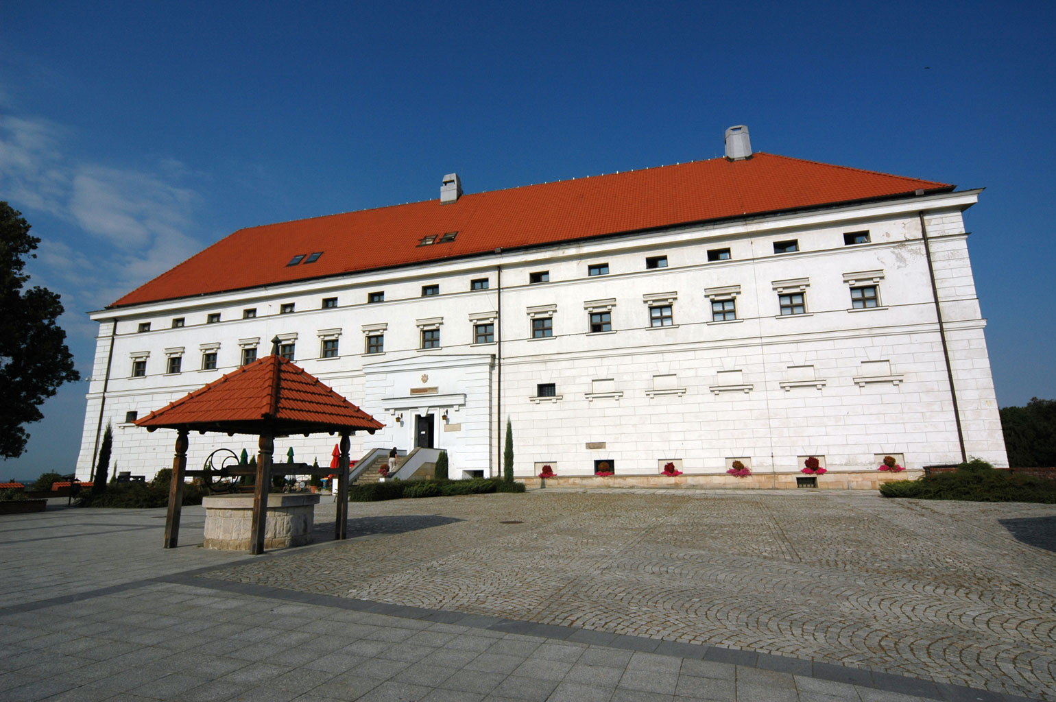 Sandomierz, ul. Zamkowa 12 - zamek królewski, obecnie muzeum okręgowe